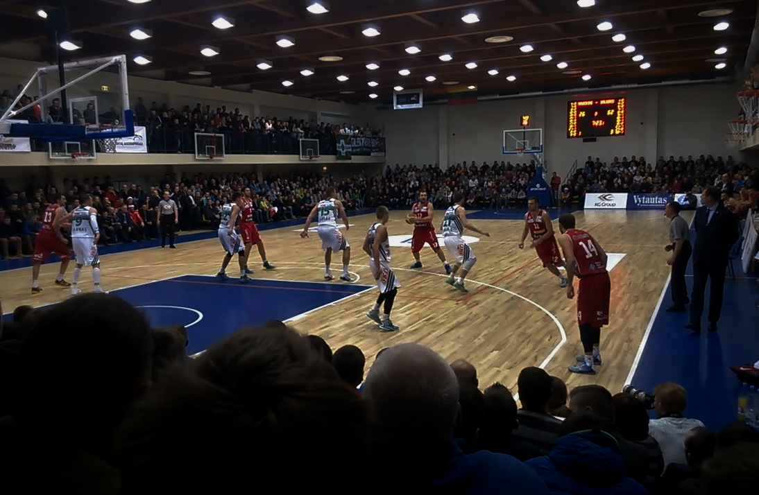 LKL rungtynės: Mažeikių „Mažeikiai“ - Kauno „Žalgiris“ 2014 m. Ventos progimnazijos salėje.